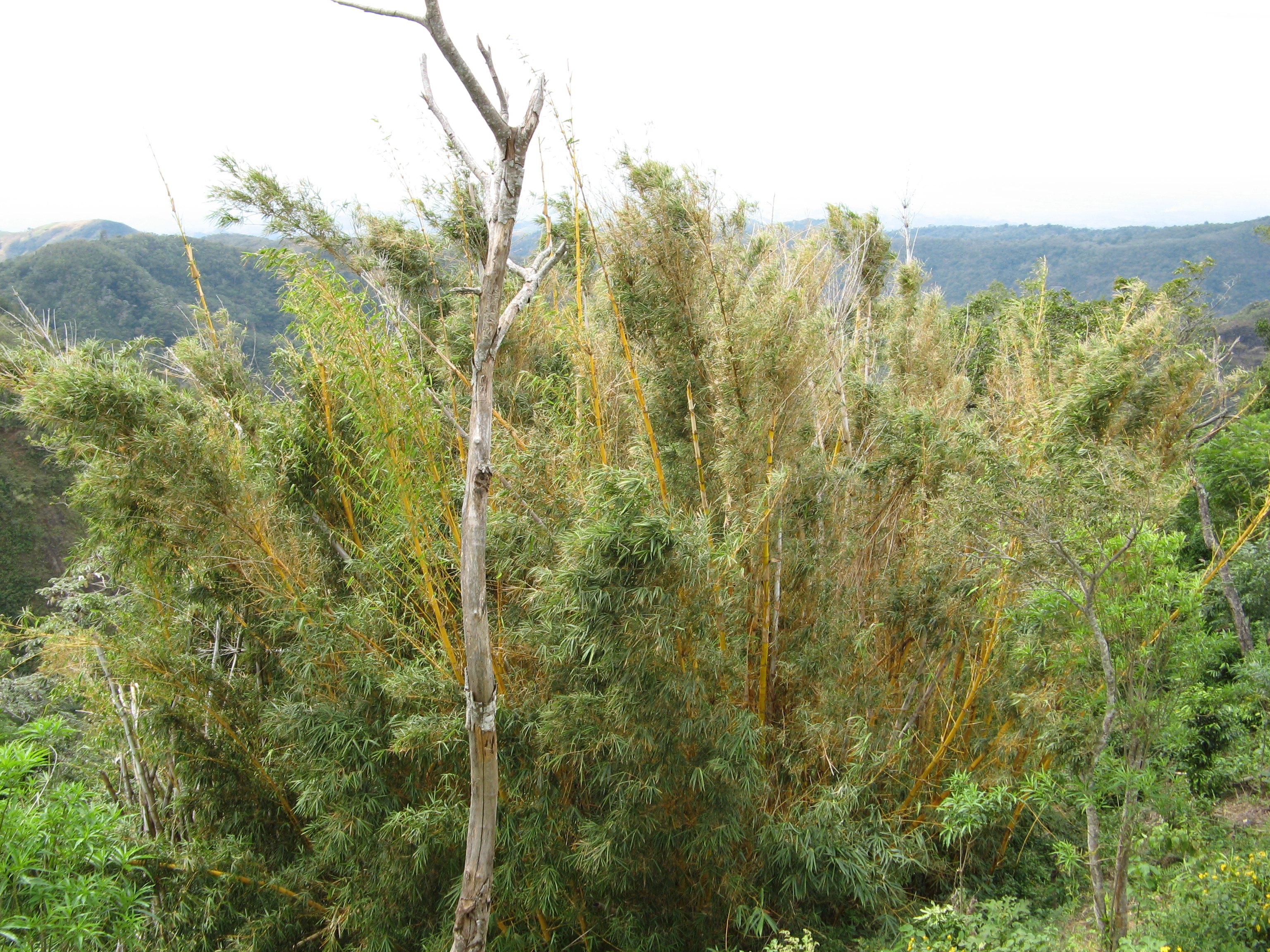 Prise à Ahuachapán, Ahuachapán (carte) Prise le 1 décembre 2006